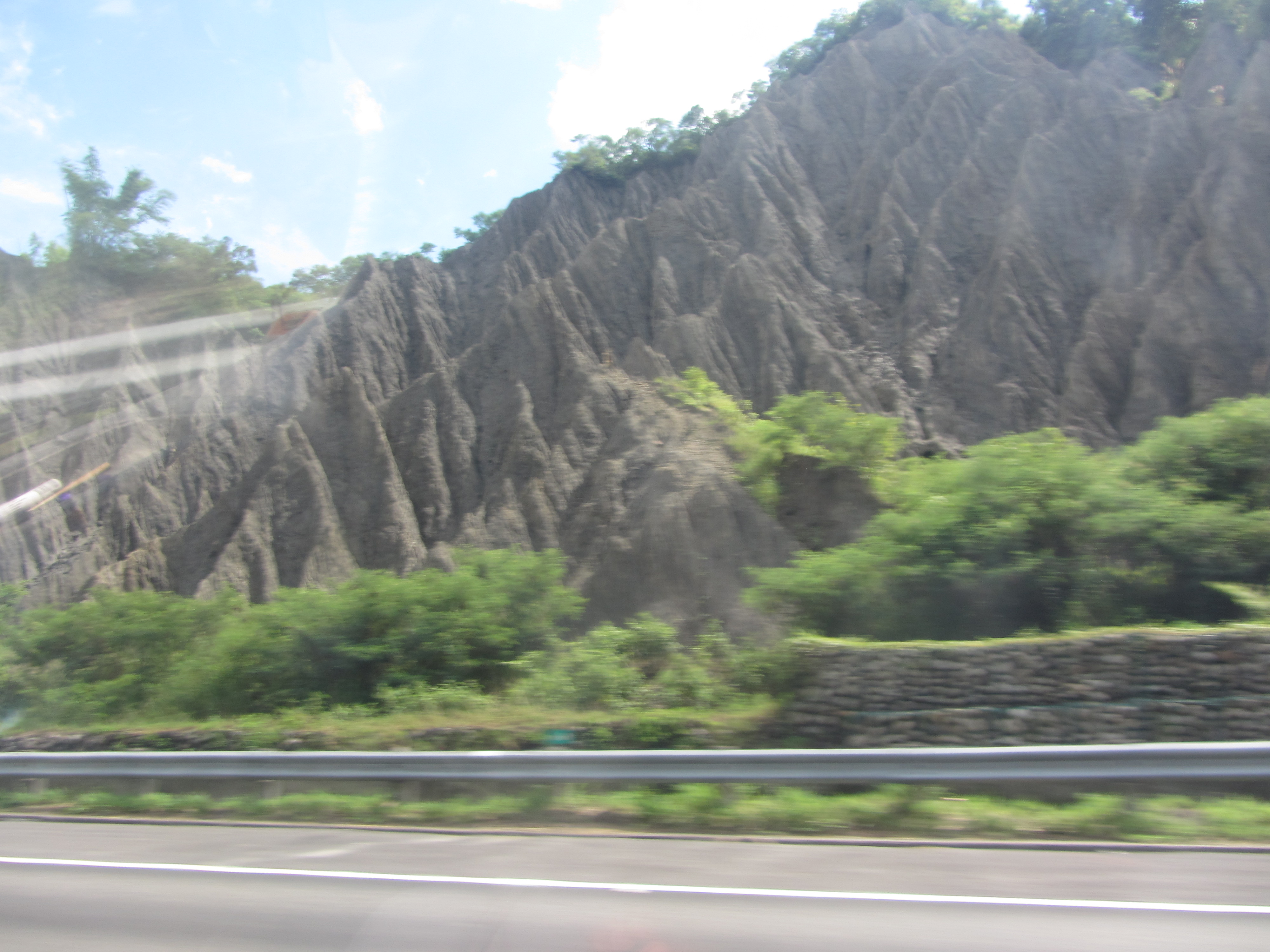 高雄市田寮區田寮月世界